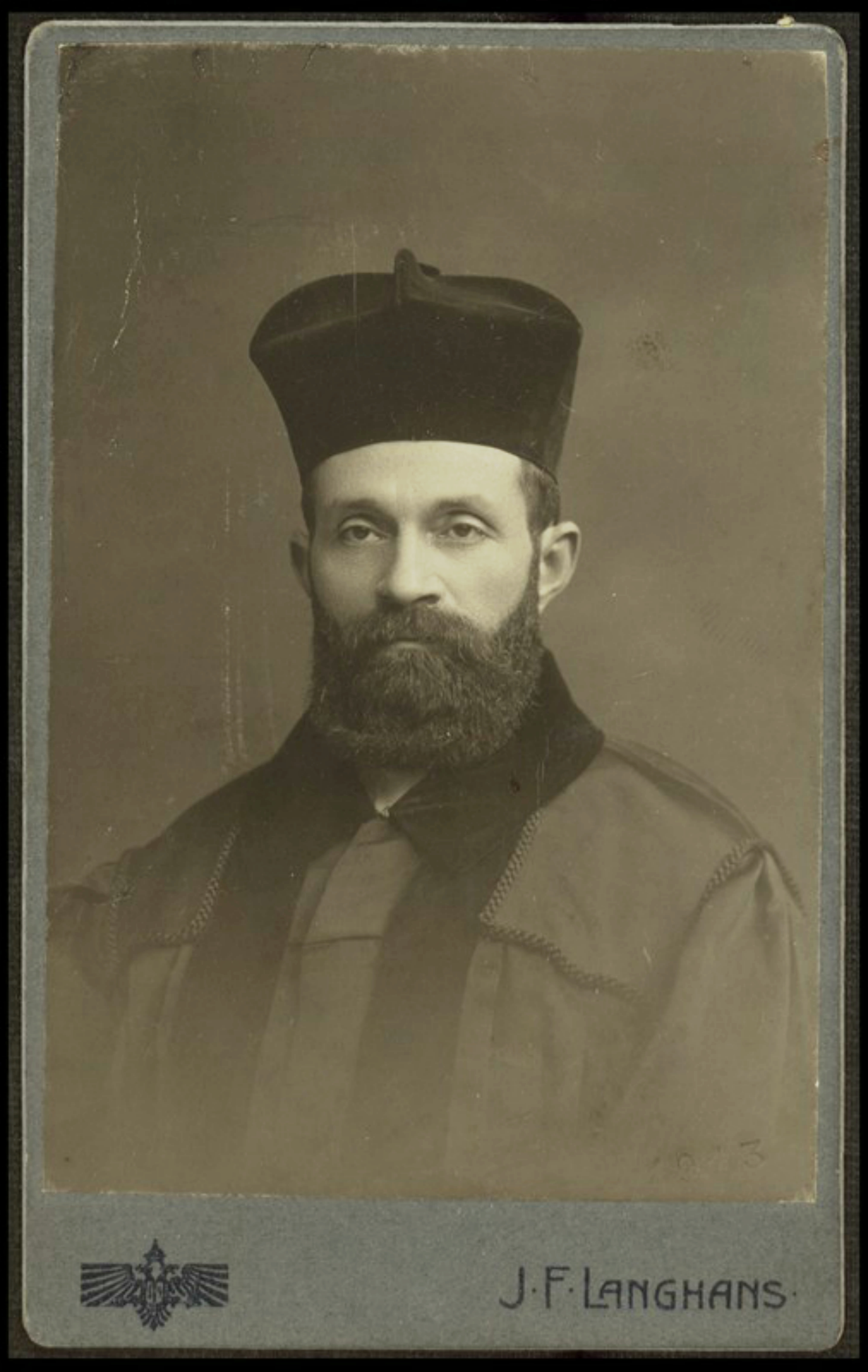 תצלום דיוקנו של חיים ברודי בגלימה וכובע של הרב הראשי: Carte de visite בגודל 7X11 ס"מ, הופק בעיר פראג, 1913. בגב התצלום נרשם בעפרון: Der Oberrabbiner Dr. Heinrich Brody.